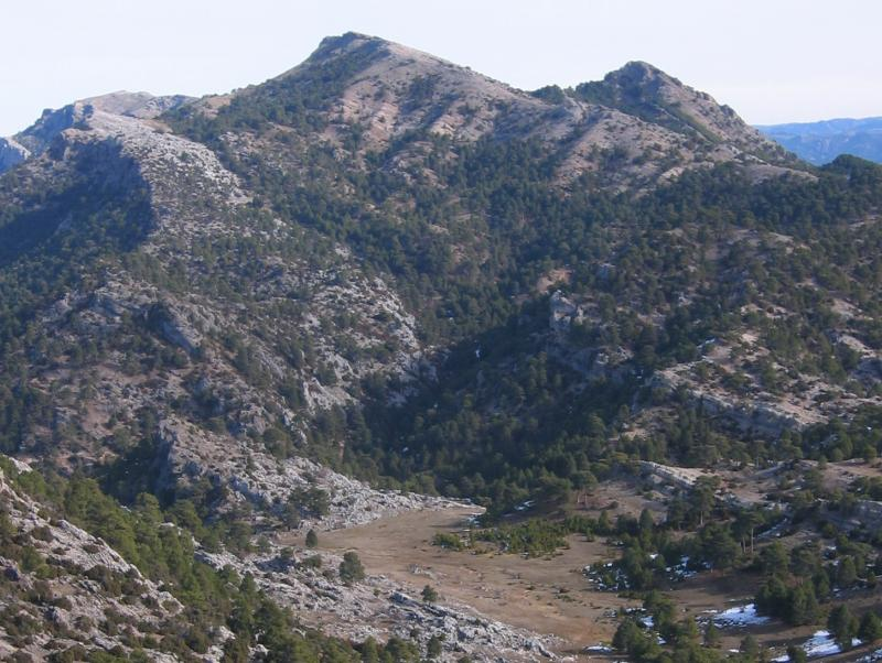 Cerro del Blanquillo o Pedro Miguel, en la Sierra de las Villas -- Juan Diego Cano Cavanillas